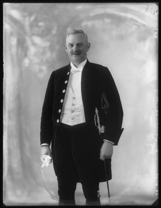 Herbert Wragg